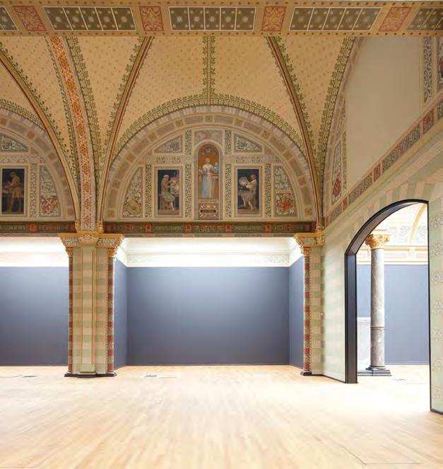 De Eregalerij zoals Cuypers hem bedoeld had.